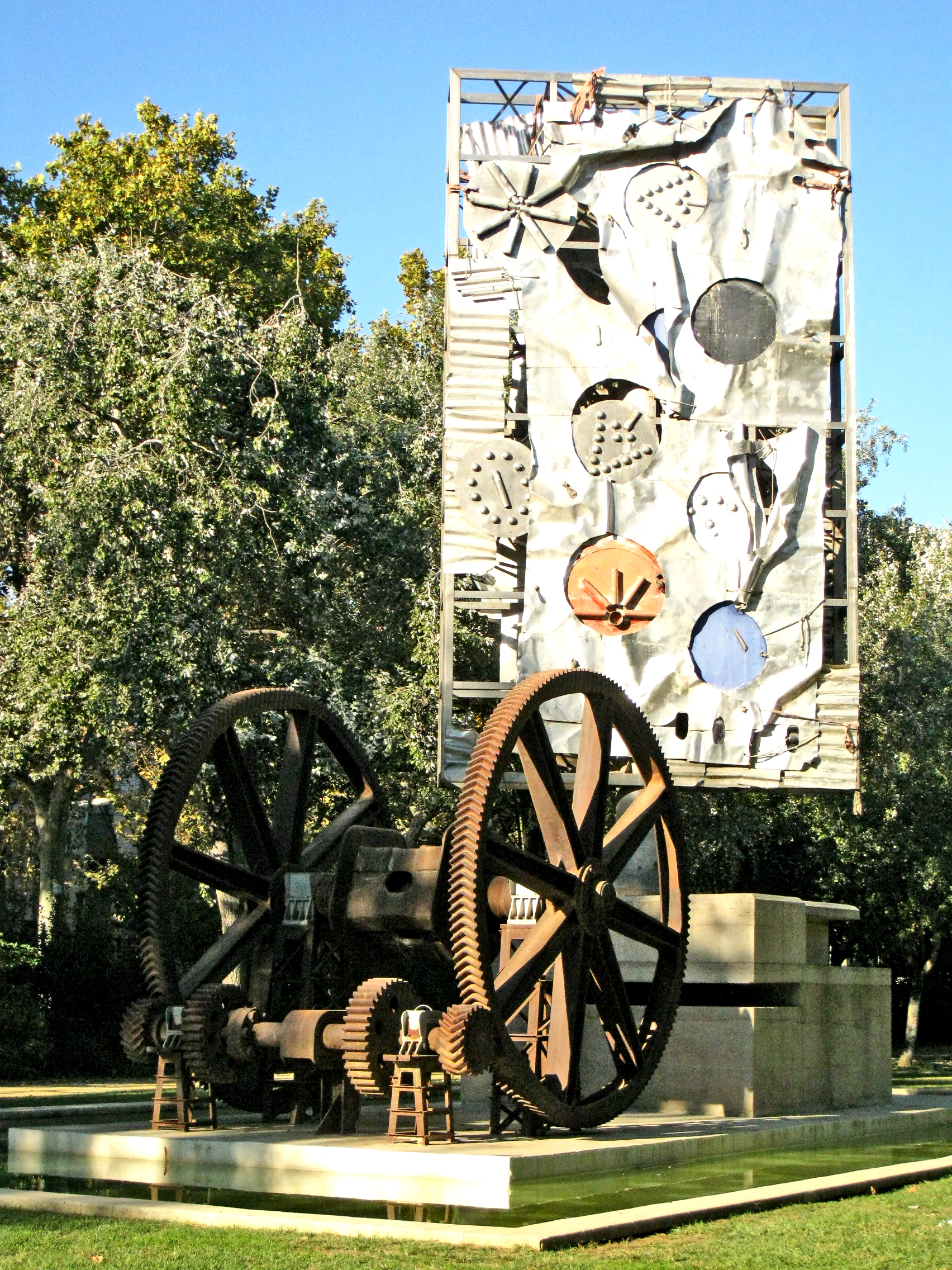 Monument al Centenari de l'Exposició, al Parc de la Ciutadella de Barcelona. Obra d'Antoni Clavé (1991), és fet d'acer inoxidable, alumini anoditzat, pintura, peces industrials de ferro i formigó armat. Es va inaugurar per commemorar els cent anys de l'Exposició Universal de 1888-1891.